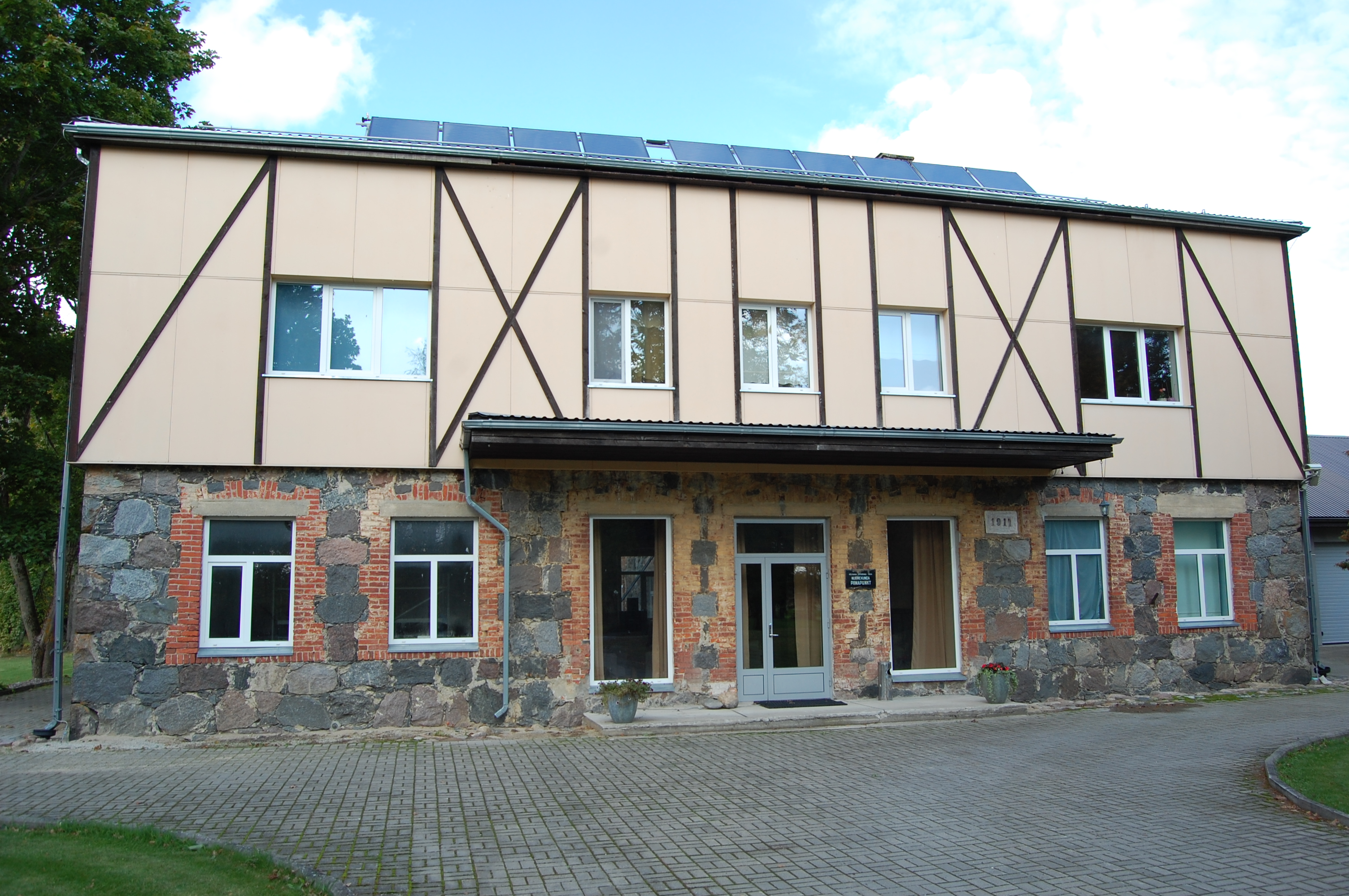 Aidu külalistemaja Põltsamaa vallas 2019. aasta septembris